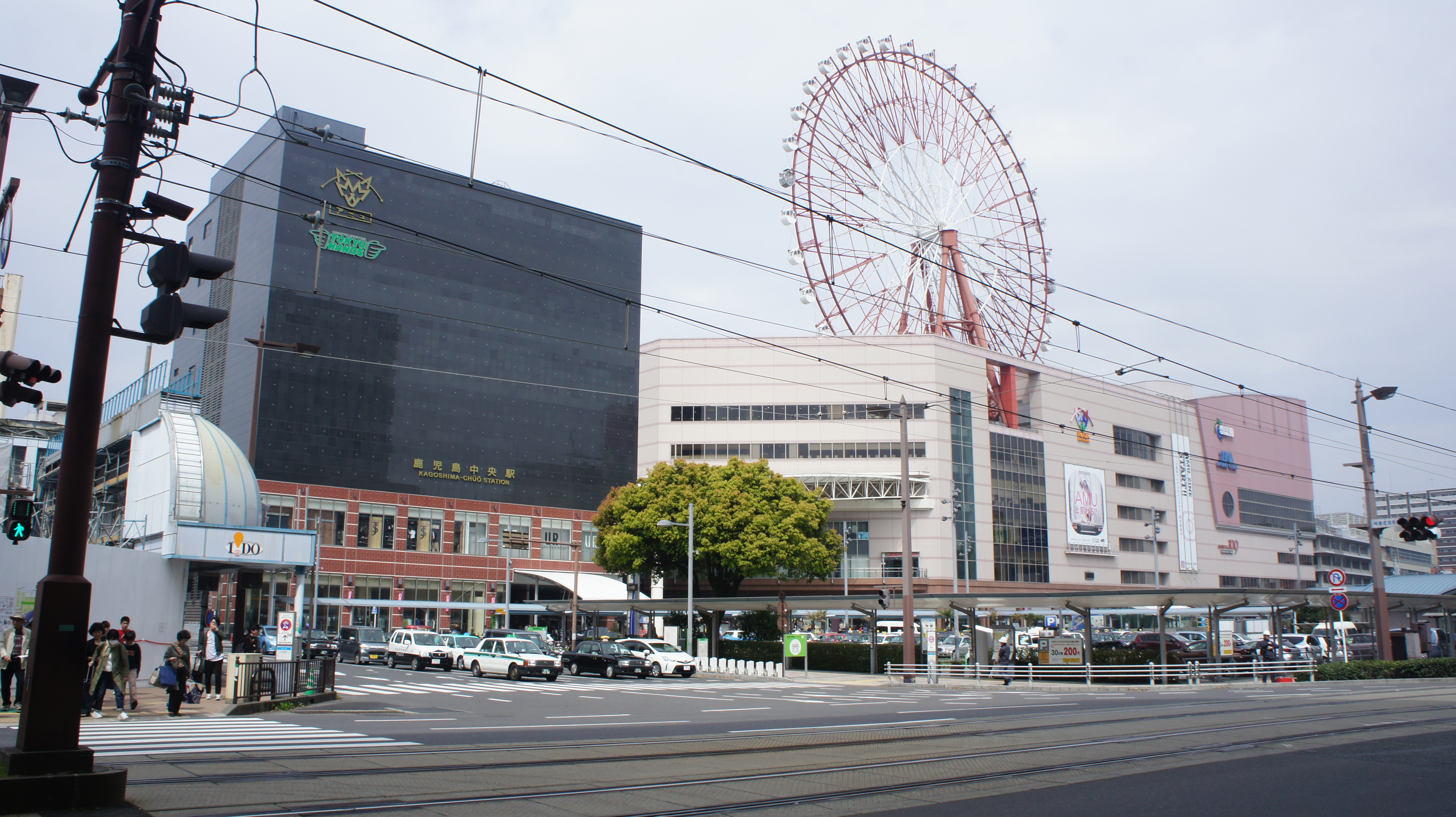 鹿児島中央駅の駅舎です。